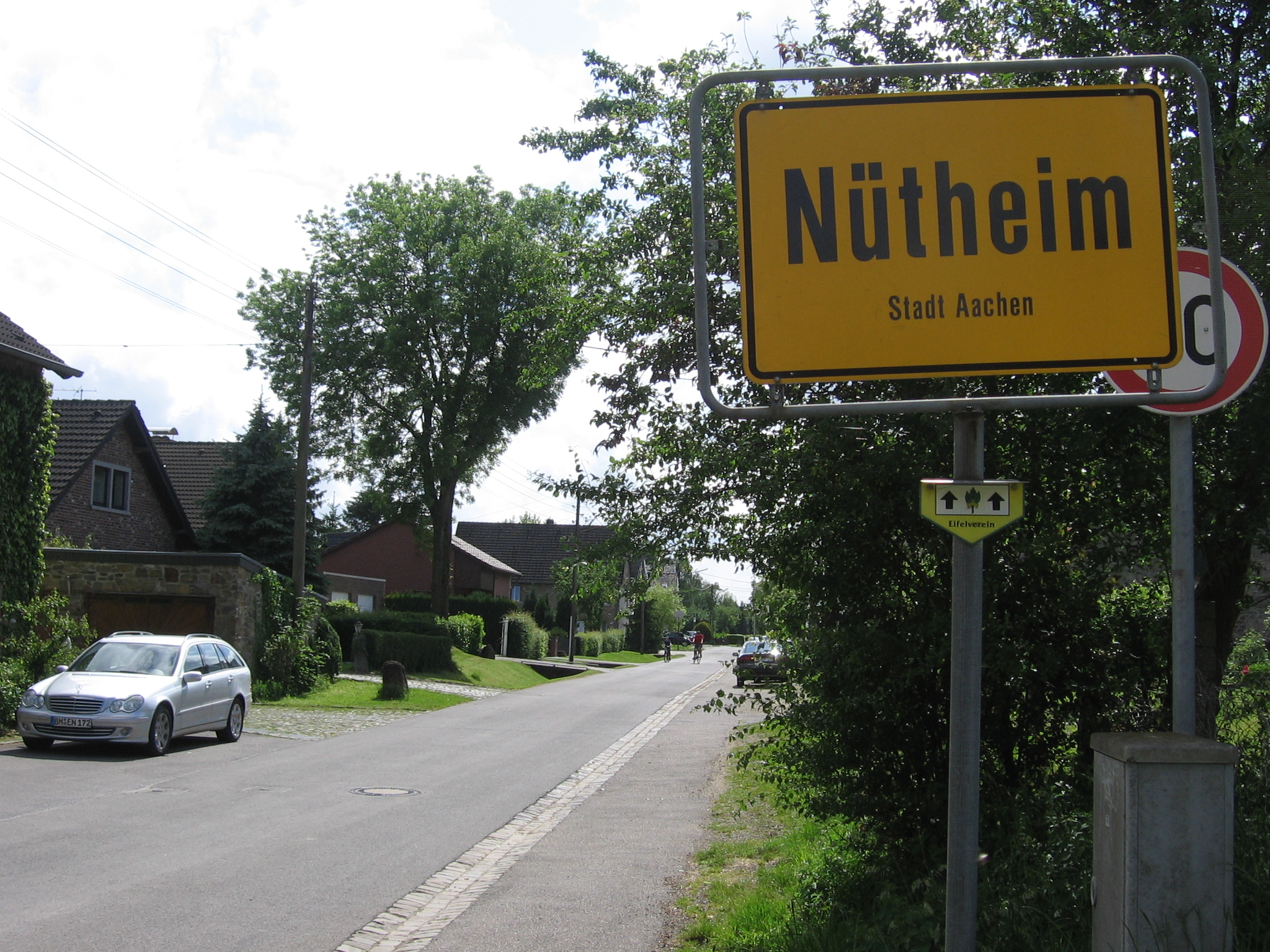 Der Ortseingang von Nütheim.